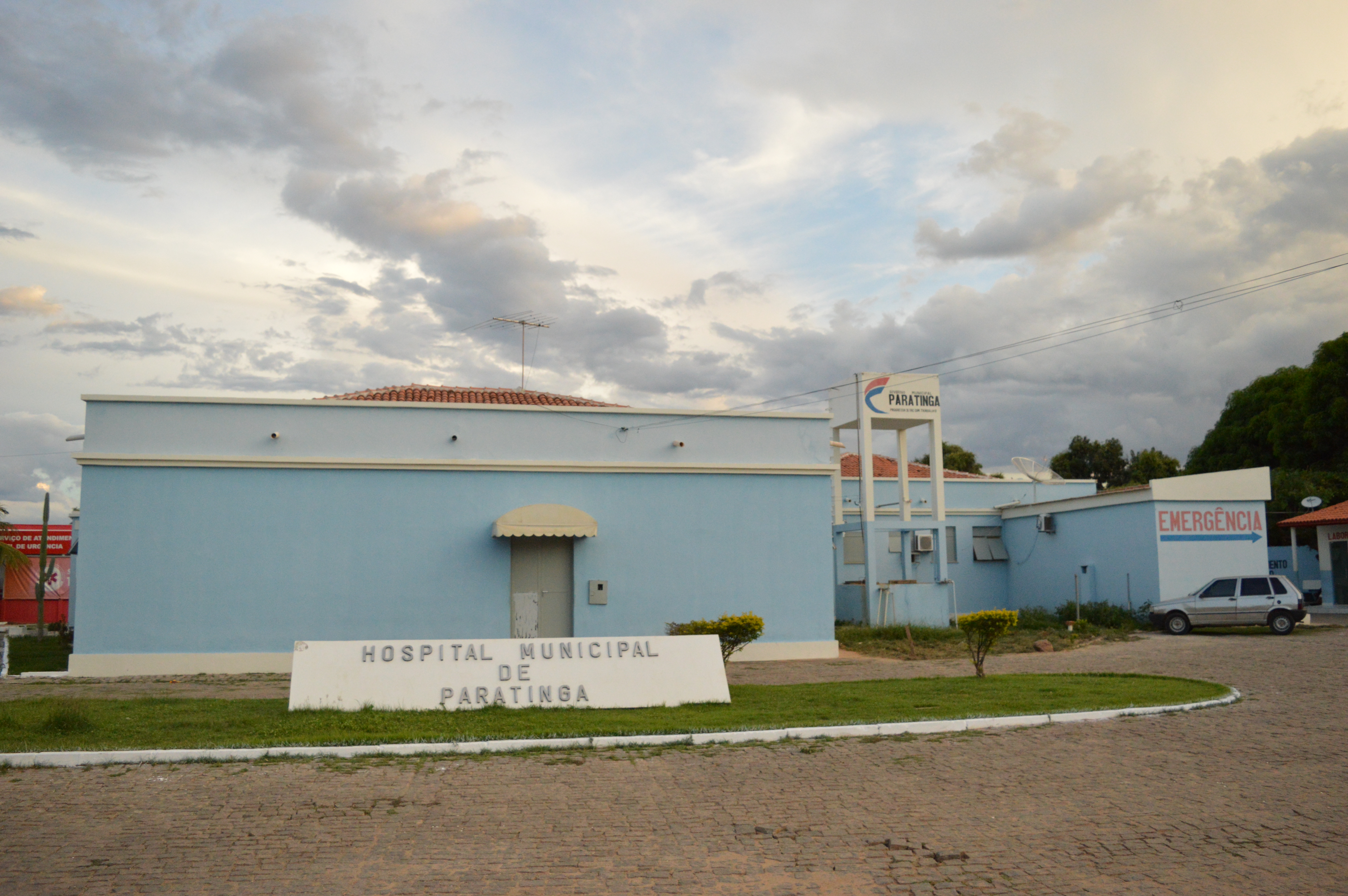 Hospital Municipal de Paratinga, localizado na cidade. Foto de 16 de janeiro de 2017.